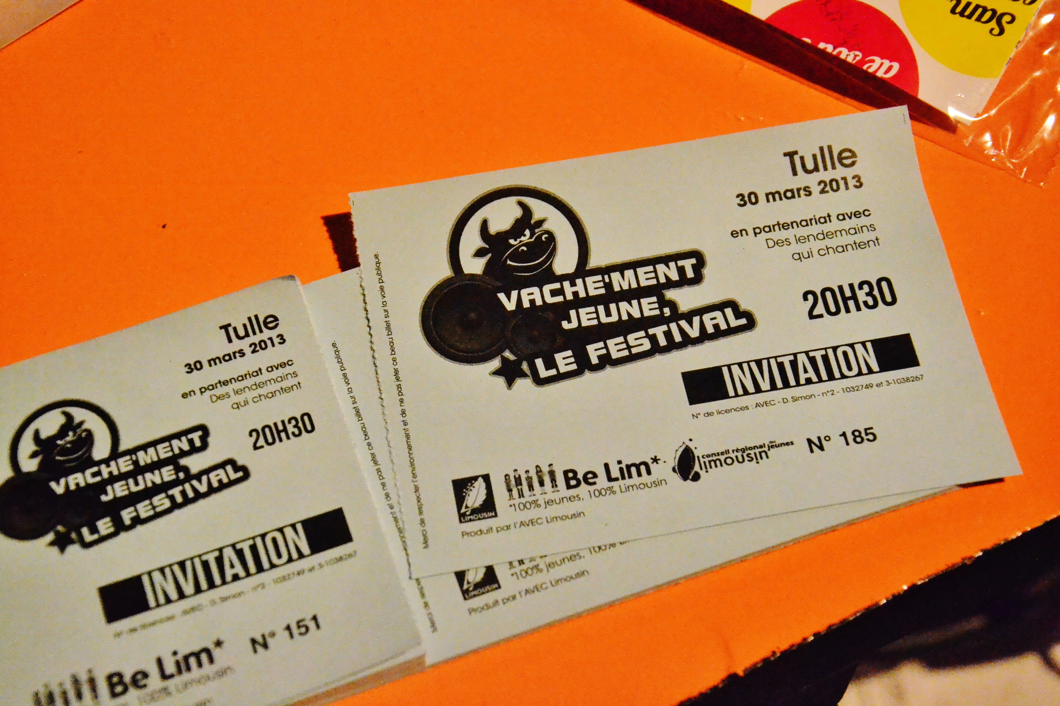 Billet d'entrée au festival Vache'ment jeune 2013, organisé par le Conseil régional des jeunes du Limousin (ici, soirée à Tulle, 30 mars 2013)